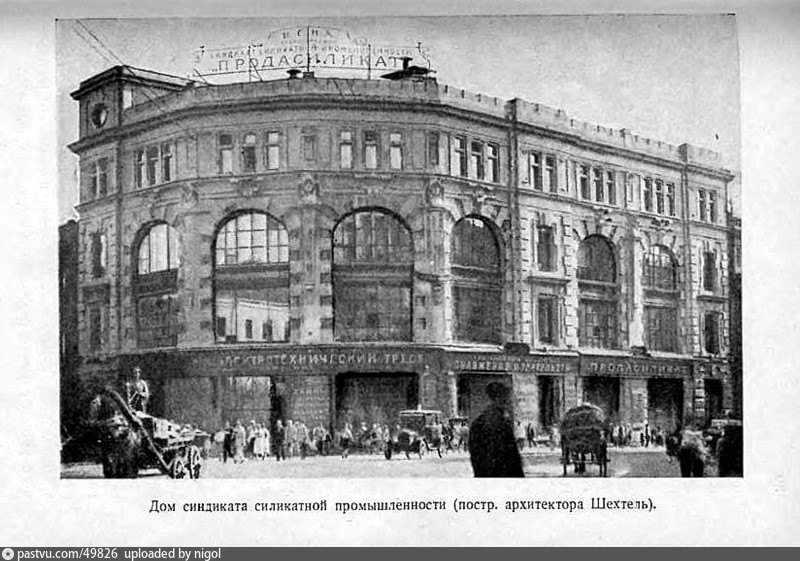 Дом фарфора на сайте проекта "Узнай Москву". Здание построено в 1898-1903 гг. по проекту Фёдора Шехтеля для Торгового общества Кузнецова. Мясницкая ул, д. 8, стр. 2